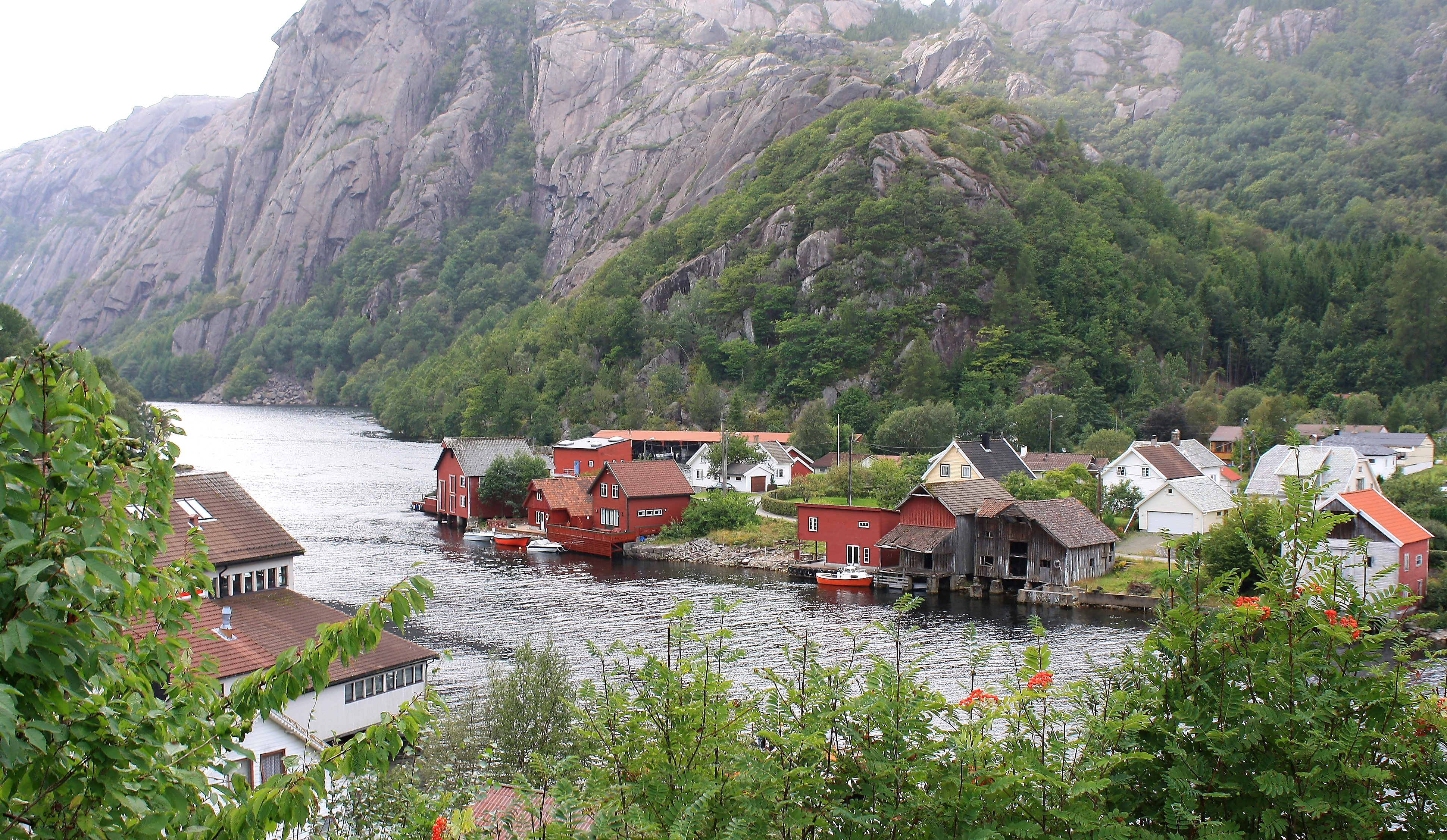 Åna-Sira. Fotografen står truleg på/ved Riksveg 44 på Vest-Agder-sida av fjorden Åna. Biletet syner sør-vestre delen av staden Åna-Sira. Grensa mellom Rogaland fylke og Vest-Agder fylke går midt etter fjorden.